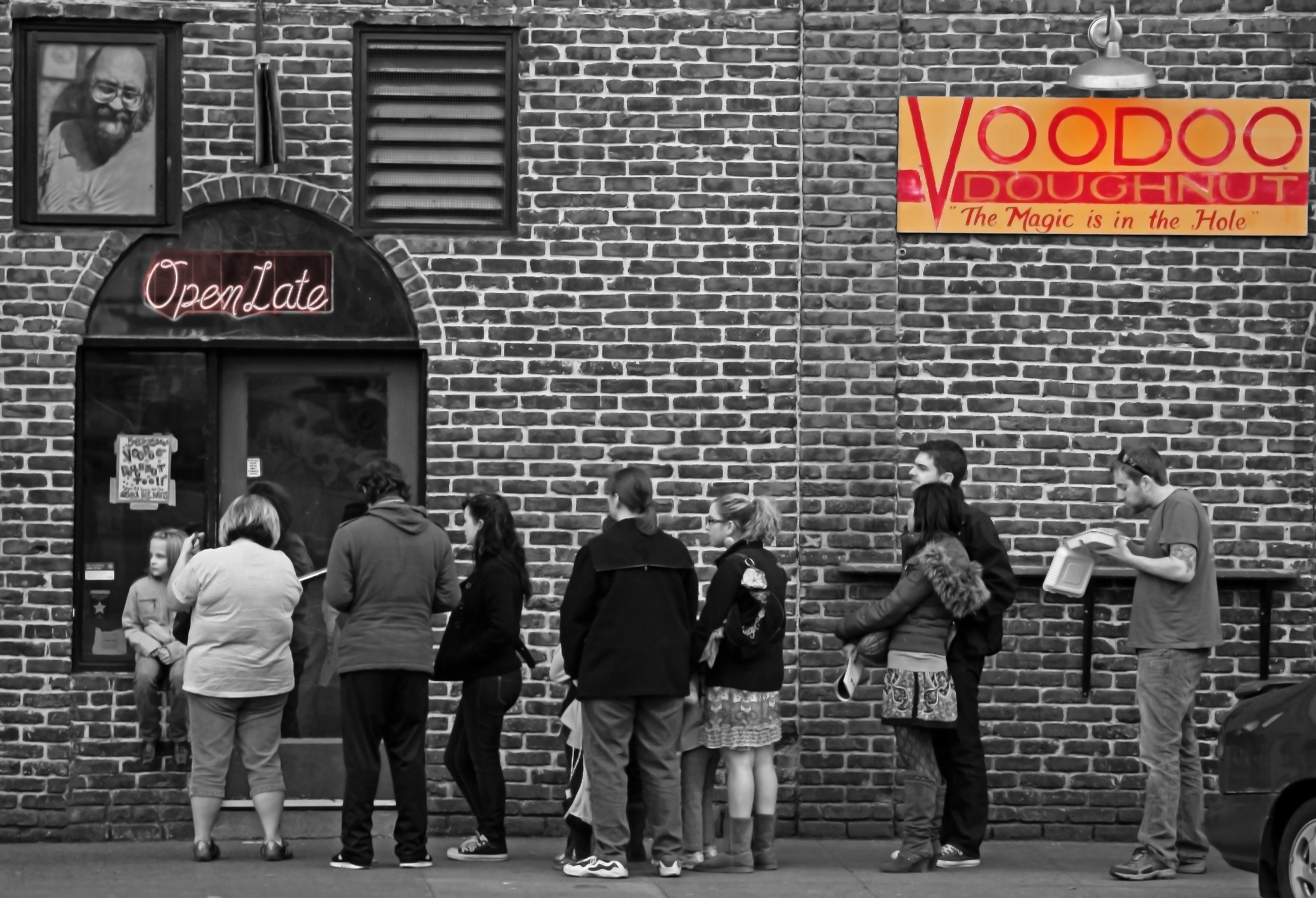 Voodoo Doughnut in Portland, Oregon.